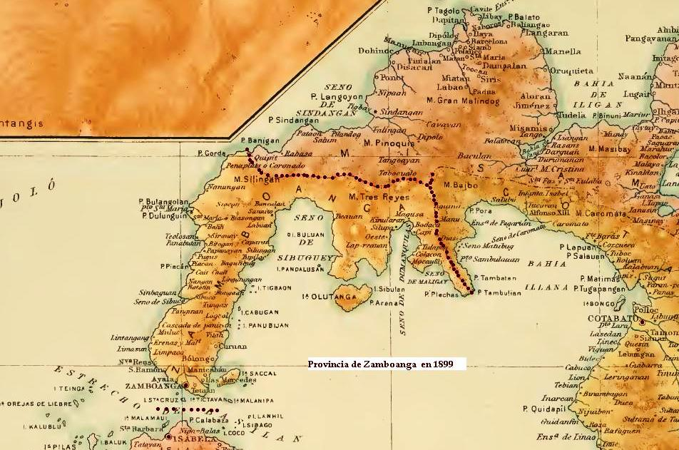 Fragmento del mapa de la página 81 del Atlas